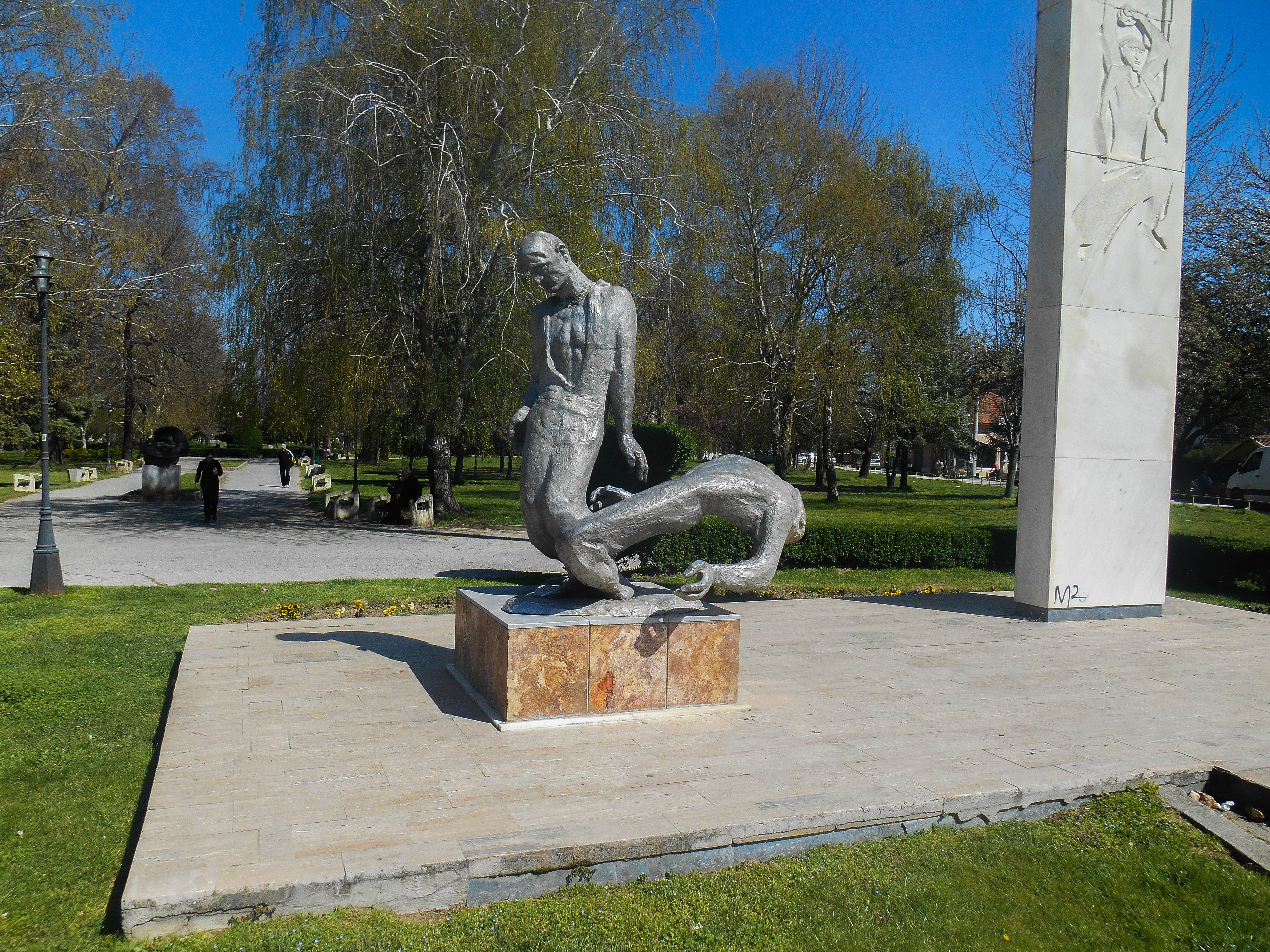 Споменик на револуцијата